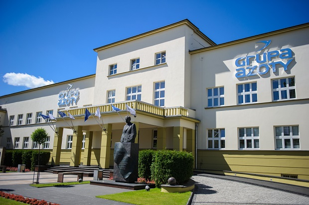 Budynek dyrekcji Grupa Azoty S.